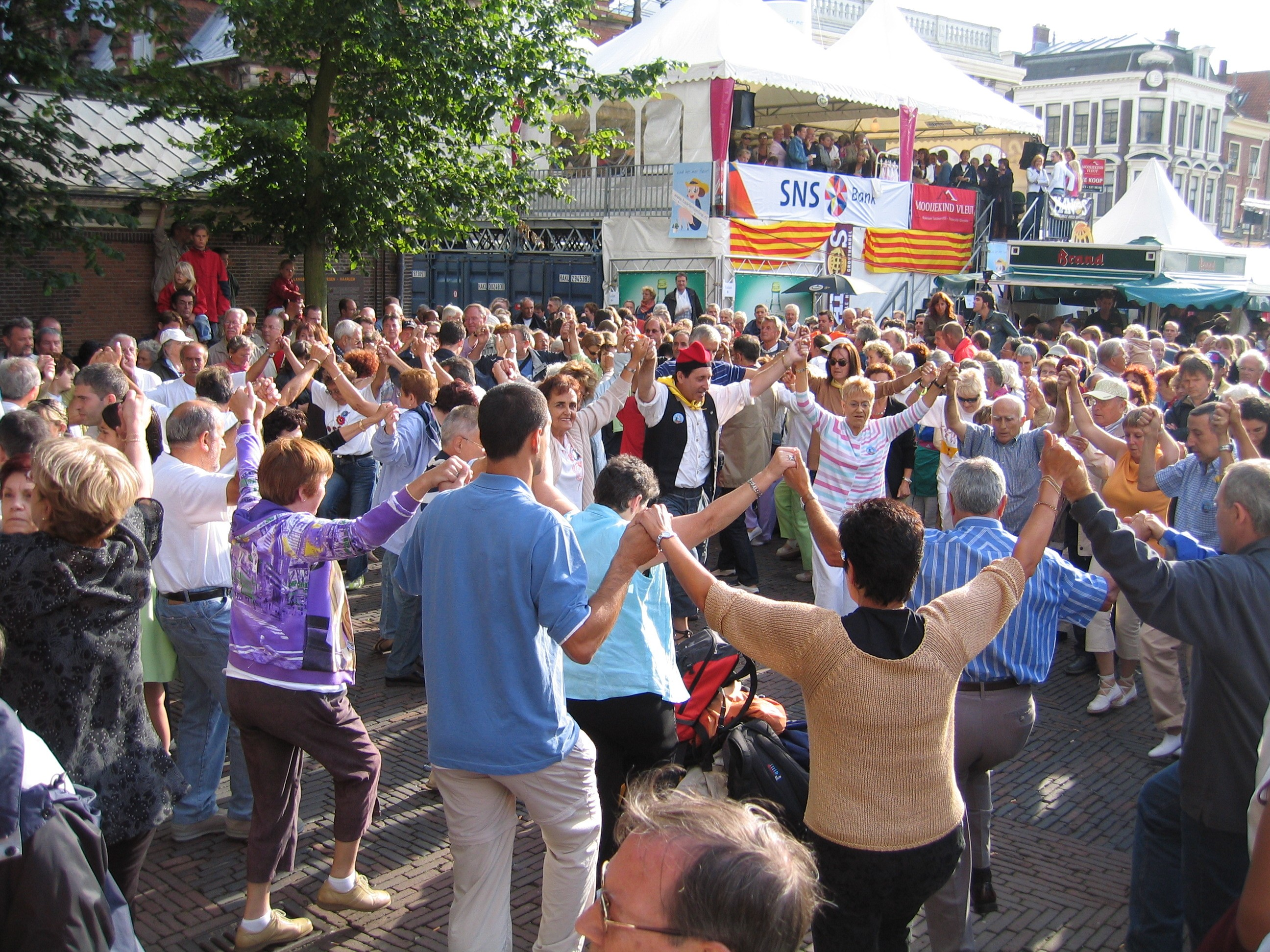 Aplec internacional de Harlem